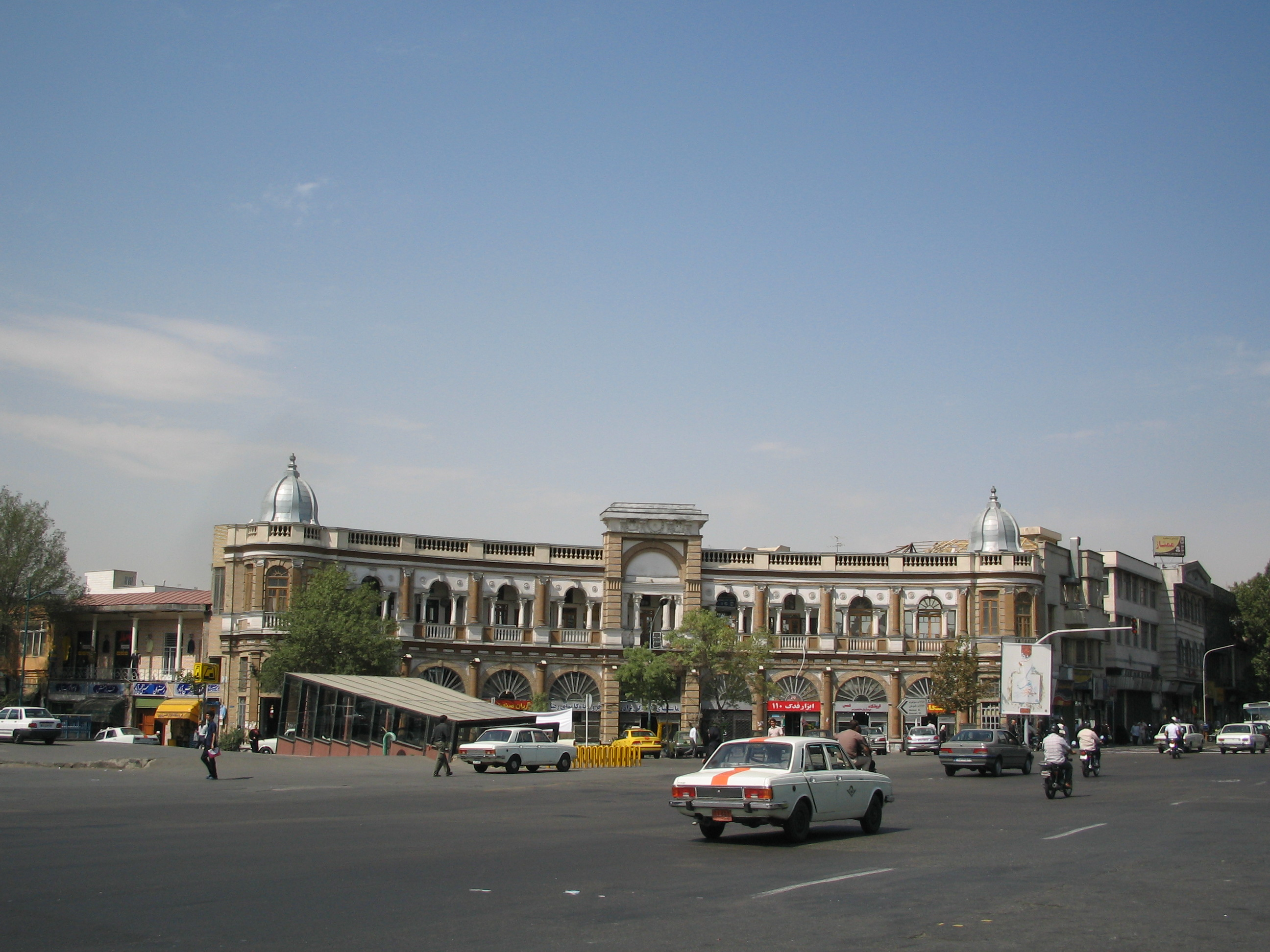 Hasan Abad Sqr, Tehran, Iran, میدان حسن‌آباد، تهران، ایران